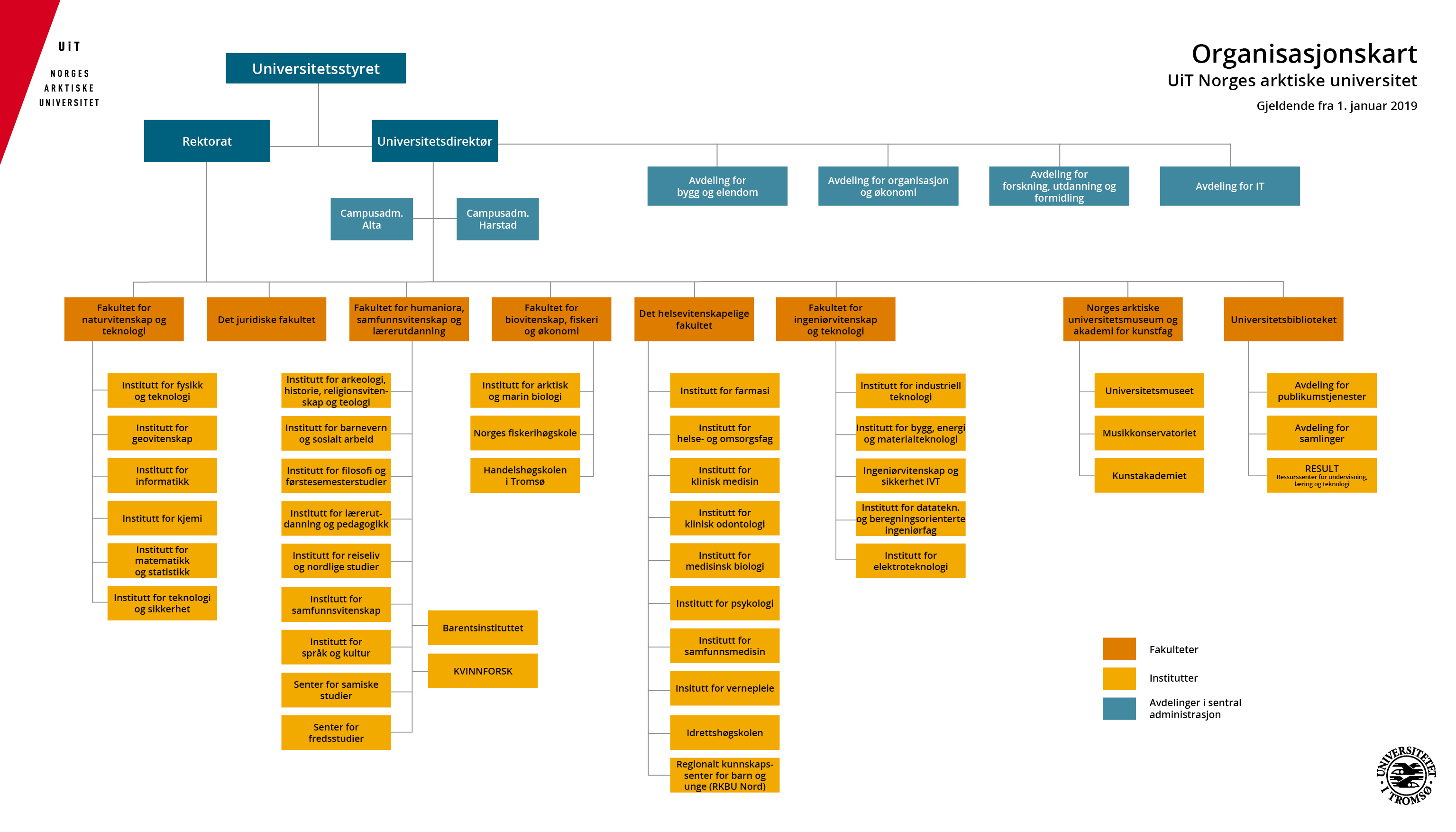 Organisasjonskart UiT fra 2019